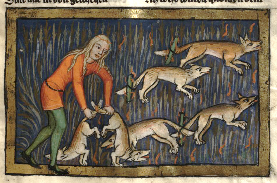 Rudolf von Ems: Weltchronik. Böhmen (Prag), 3. Viertel 14. Jahrhundert. Hochschul- und Landesbibliothek Fulda, Aa 88. Bildbeschreibung nach Martin Roland. Miniatur 115 193r Simson jagt Füchse mit brennenden Fackeln an den Schwänzen in die Felder der Philister